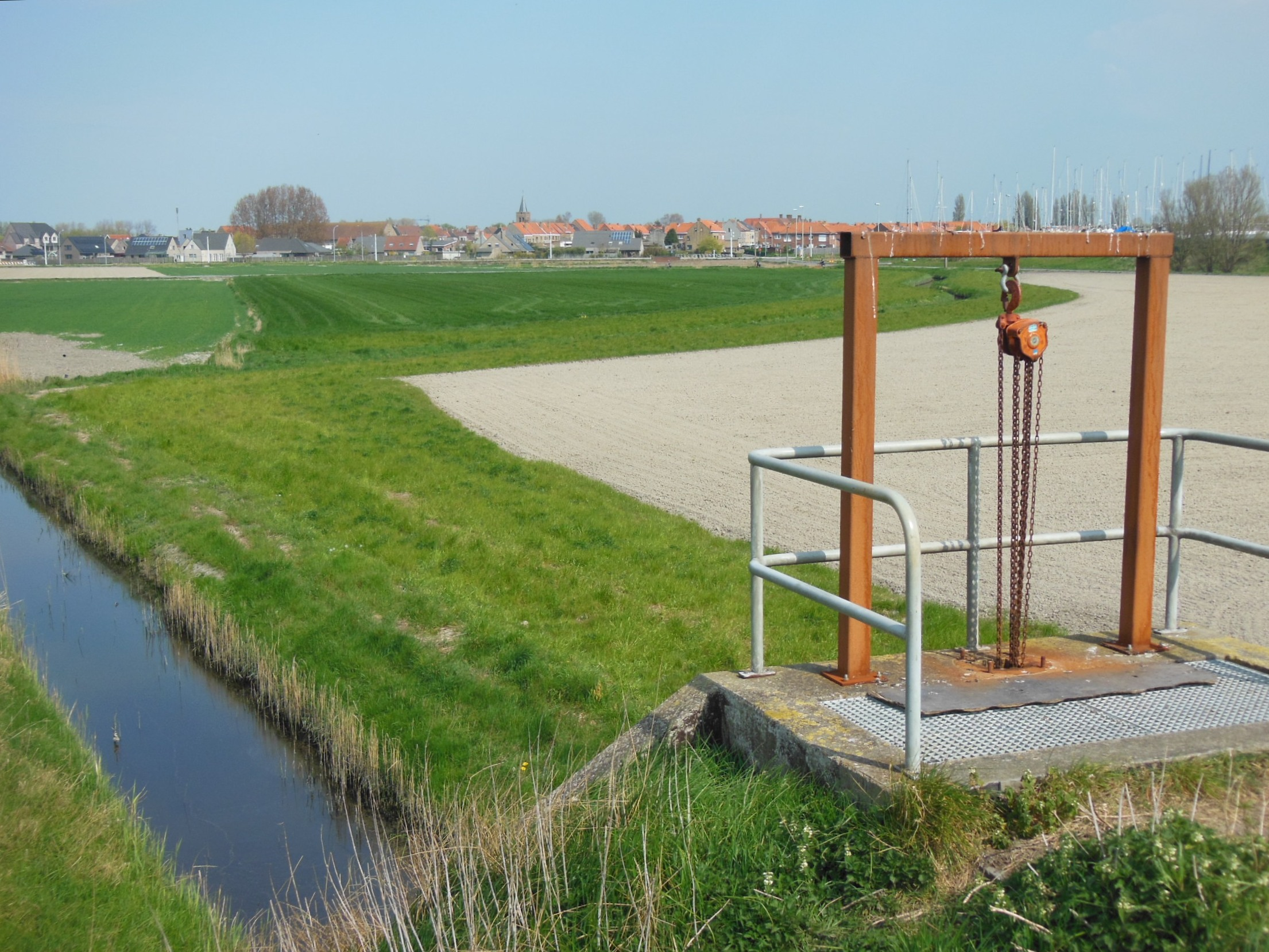 Links Het Geleed. Rechts de bovenconstructie van het Piete Sas: een betonnen plaat met een galg waaraan een katrol en een ketting om het schot te lichten, omgeven door een railing. Daarachter de polder, een niet bebouwde strook langs Het Geleed en een akker. Op de achtergrond het dorp Lombardsijde.